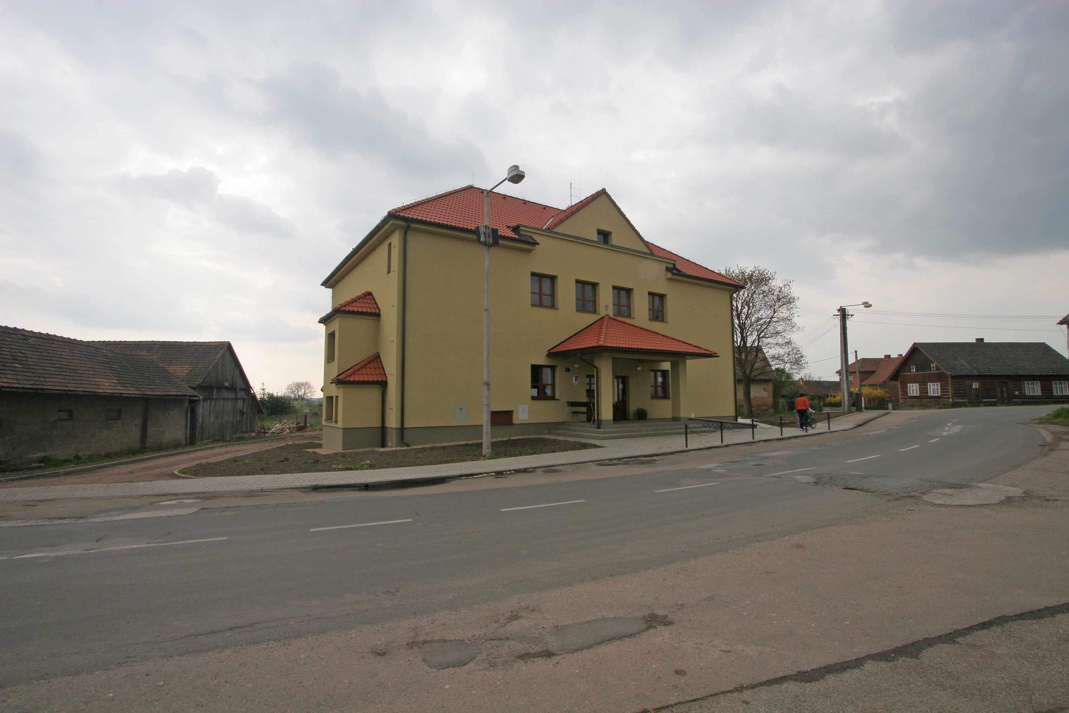 Vinary obecní úřad